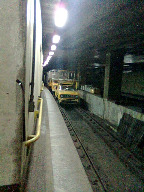 Foto do ramal Moema na estação Paraíso do Metrô de São Paulo. Ele se localiza no piso sentido Tucuruvi. Foi tirada por mim através do meu celular. O ramal é uma linha que nunca foi ativada, porém os trilhos existem e são utilizados, como se vê na foto, para estacionamento das máquinas de manutenção. Na foto, dois caminhões Chevrolet 1970 híbridos, que podem andar sobre os trilhos e sobre o asfalto, movidos por tração própria a diesel.